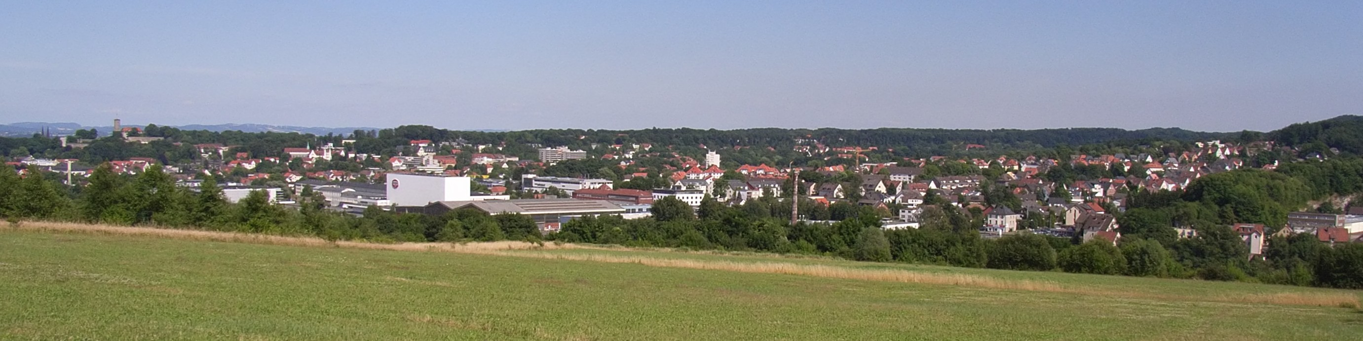 Bielefeld, Deutschland: Blick vom Blömkeberg auf den Stadtbezirk Gadderbaum mit den v. Bodelschwinghschen Anstalten Bethel.